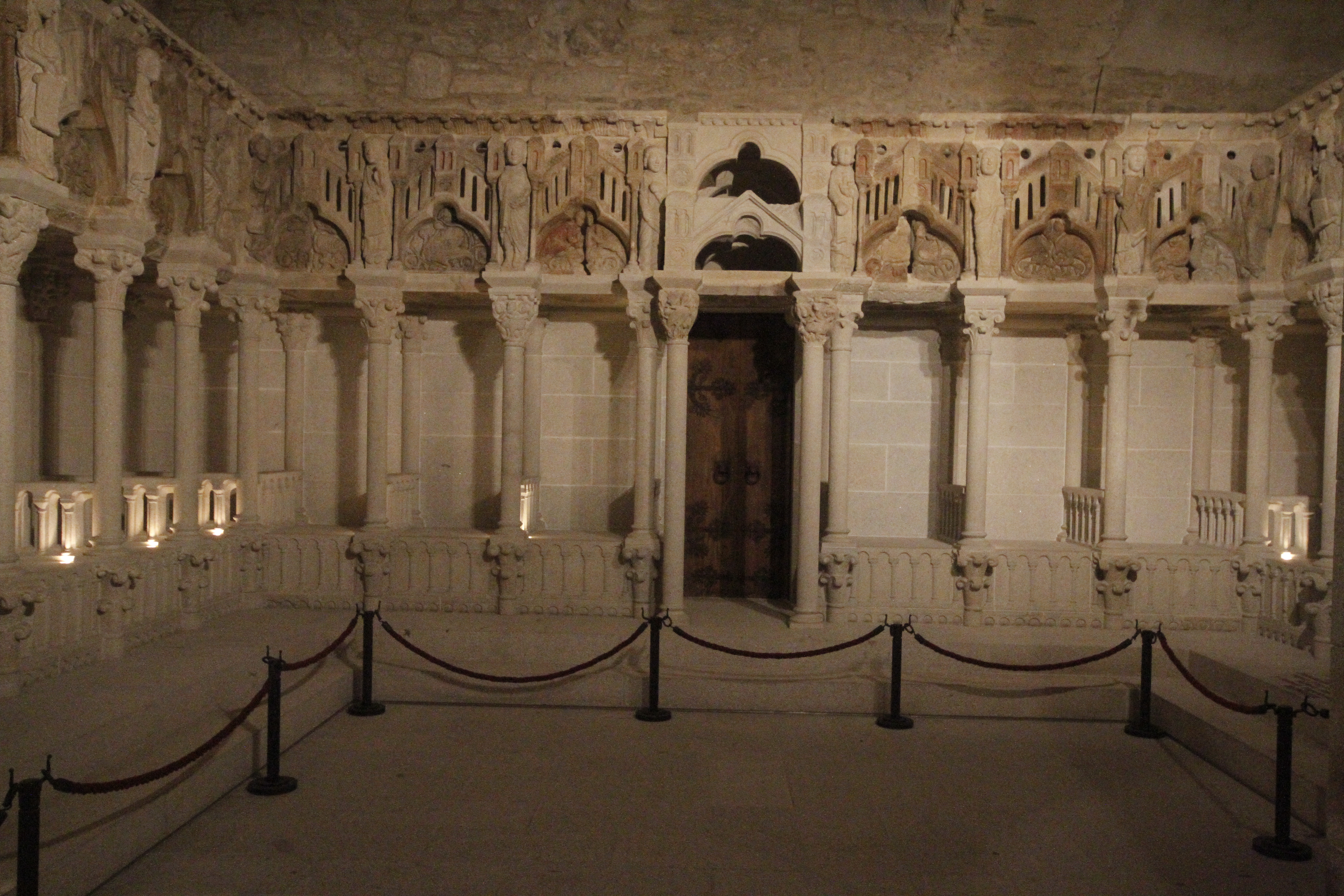 Coro em pedra do mestre Mateo